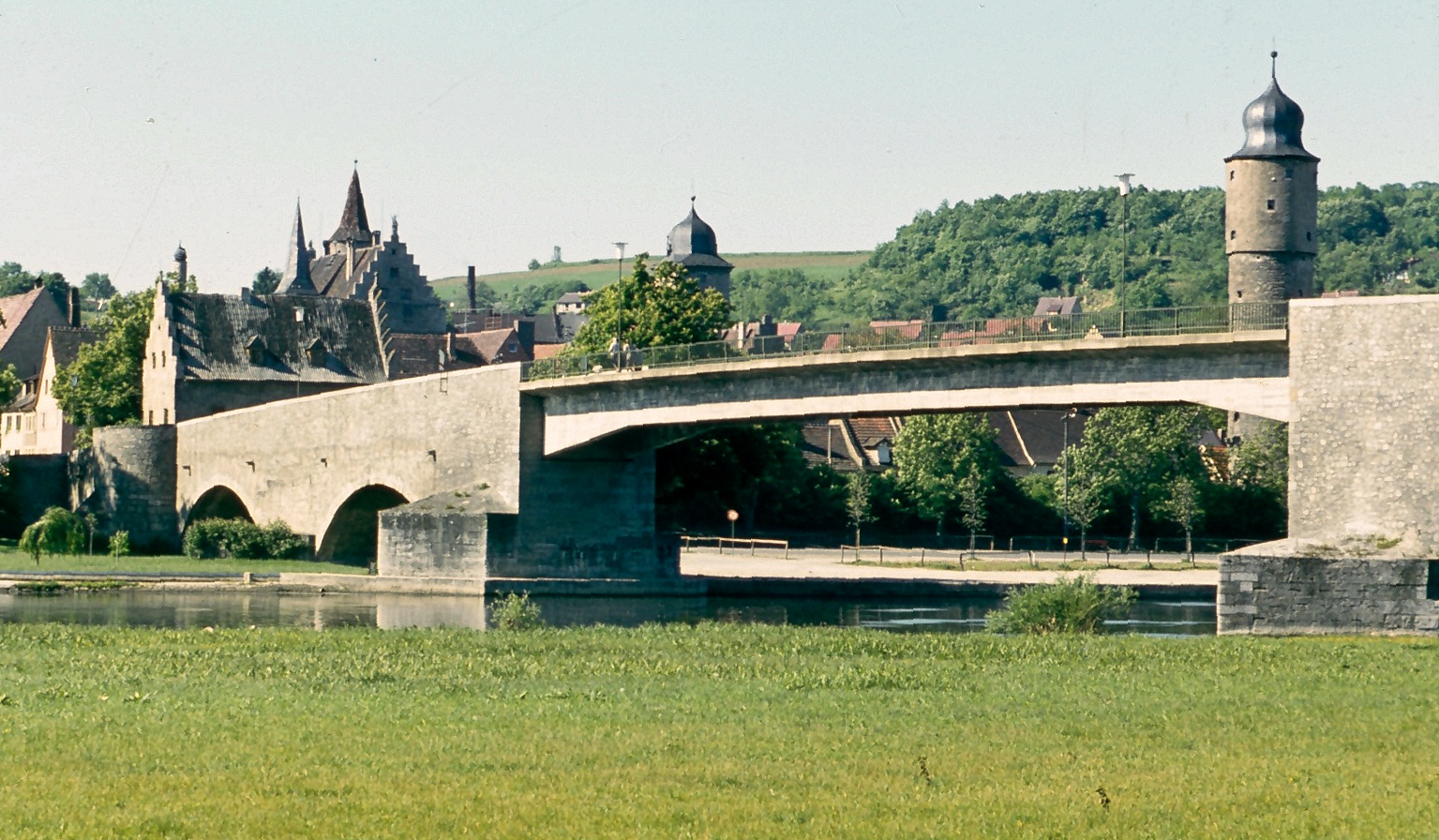 Ochsenfurt, Germany: Alte Mainbrücke, after the post-WW II rebuilding